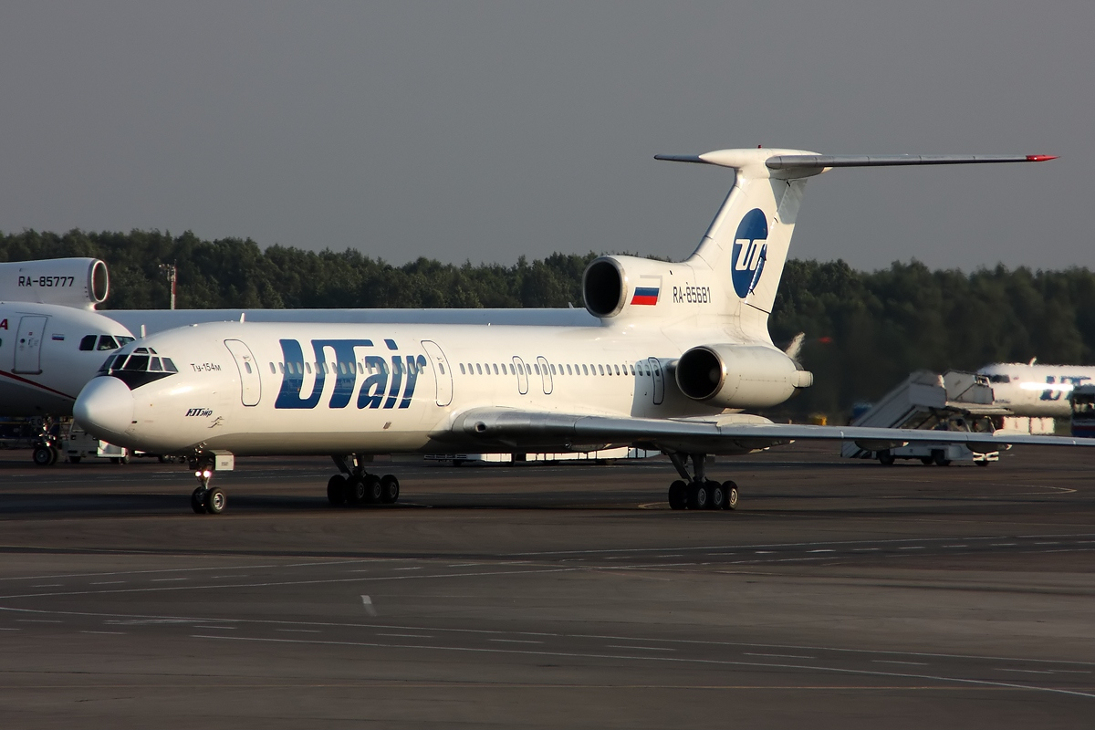 UTair Tupolev Tu-154M